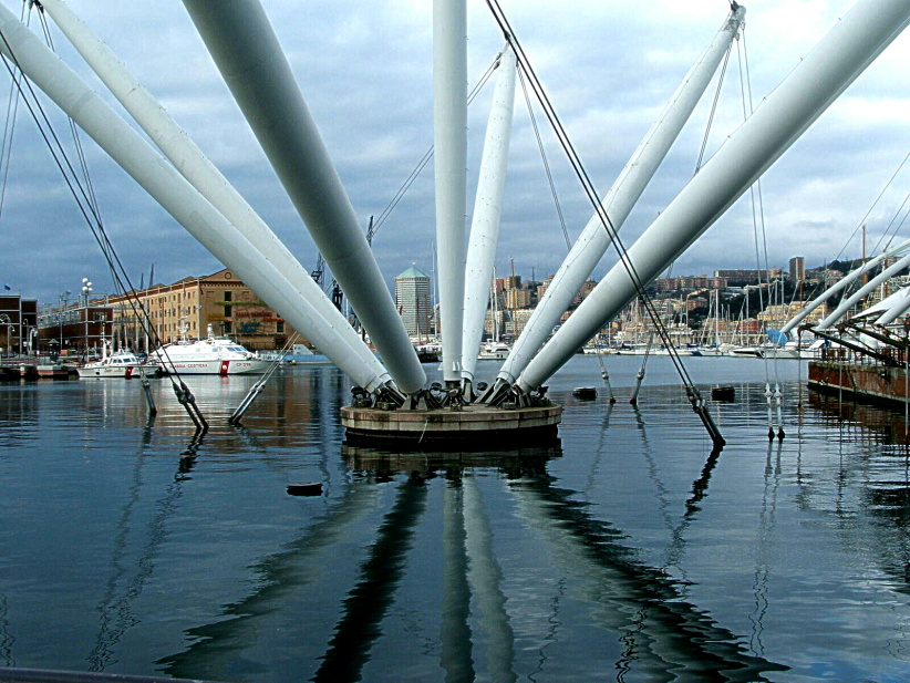 Immagine del "Grande Bigo" al porto antico di Genova, Italia. Sullo sfondo i Magazzini del Cotone e il Matitone